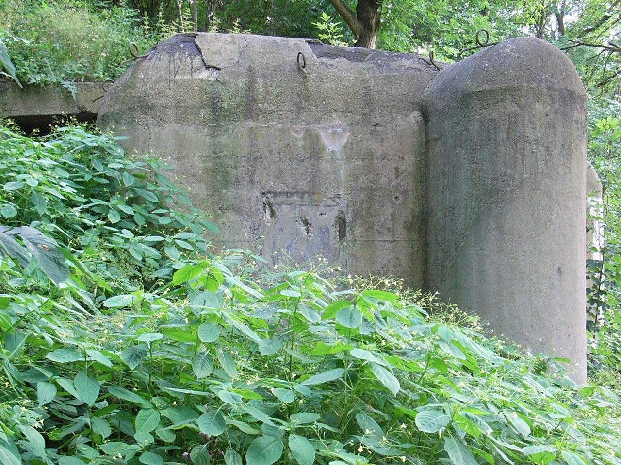 Ohrenstand LB 37 A an der Ohře in Louny